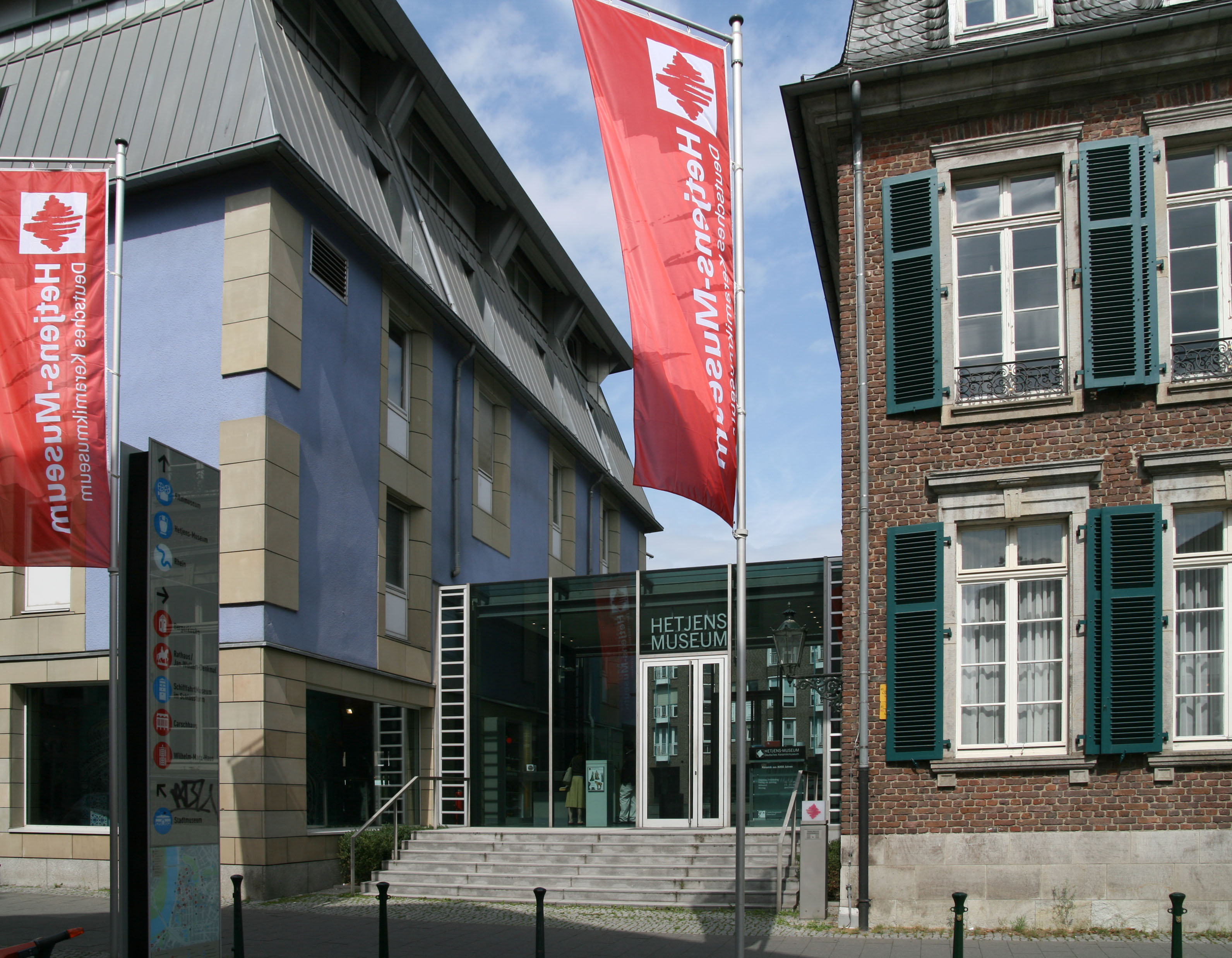 Hetjens-Museum/Deutsches Keramikmuseum, Düsseldorf, Germany